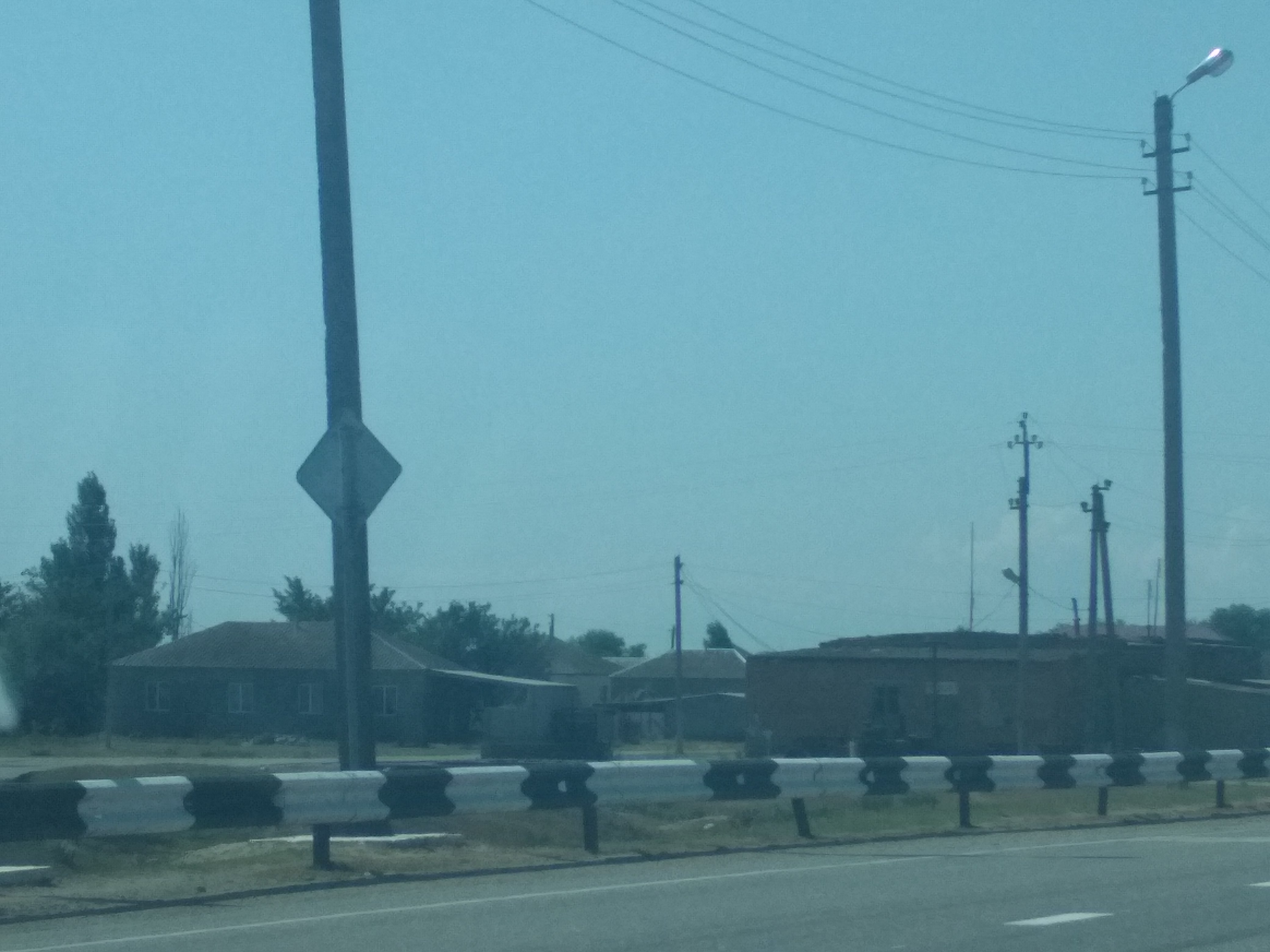 Нохчийн: Камбулат